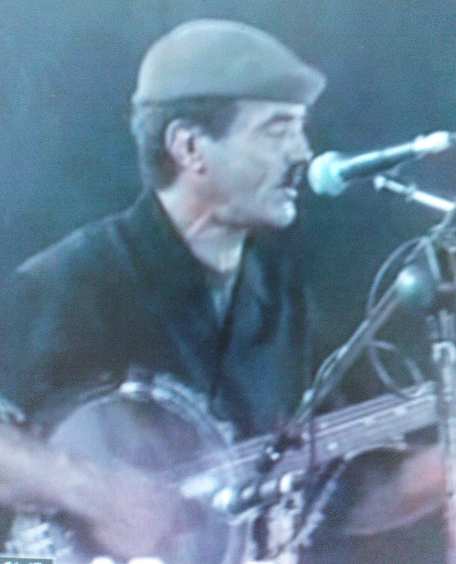 Tašlḥiyt/ⵜⴰⵛⵍⵃⵉⵜ: awlaf n tarabbut n iznẓarn εabdlḥadi ( εabdlḥadi )